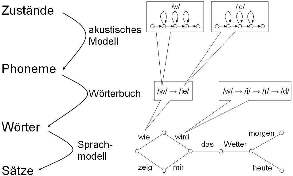 Modell einer Spracherkennung nach Waibel, selber gezeichnet